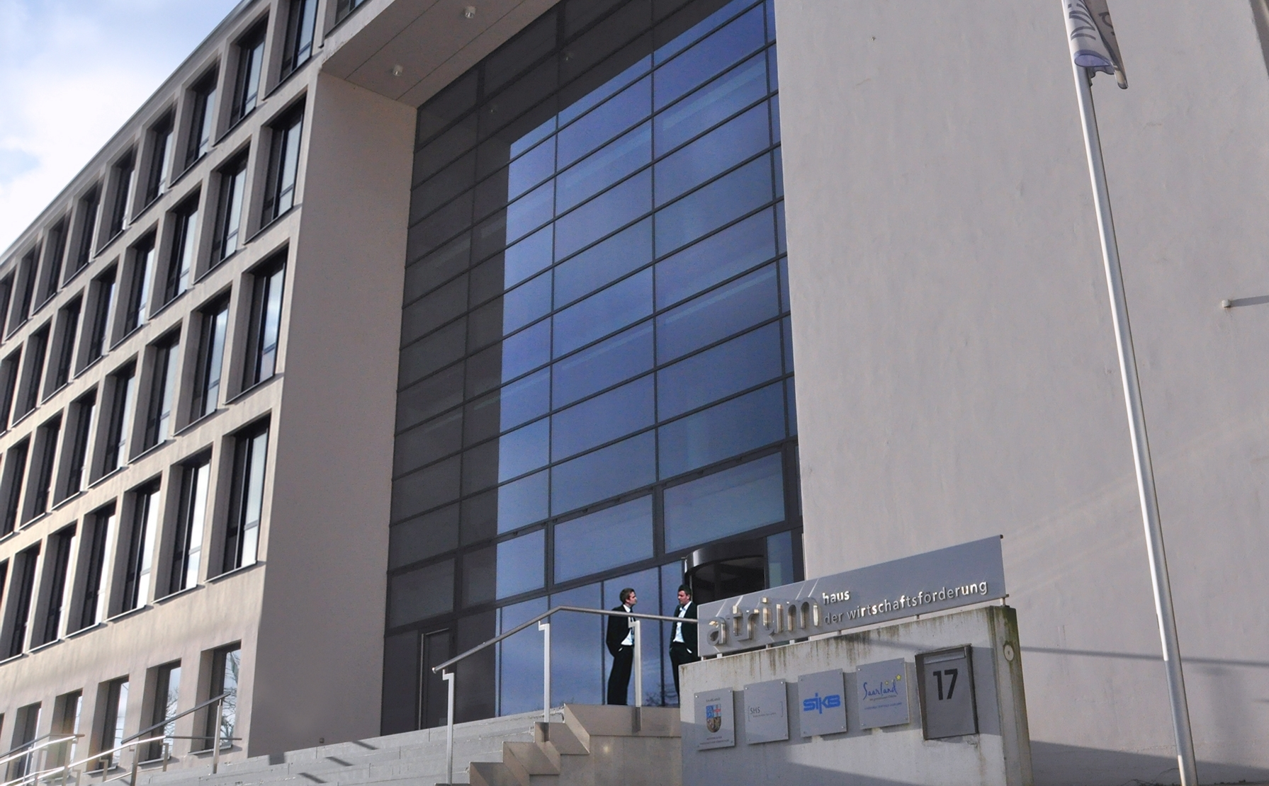 Atrium - Haus der Wirtschaft